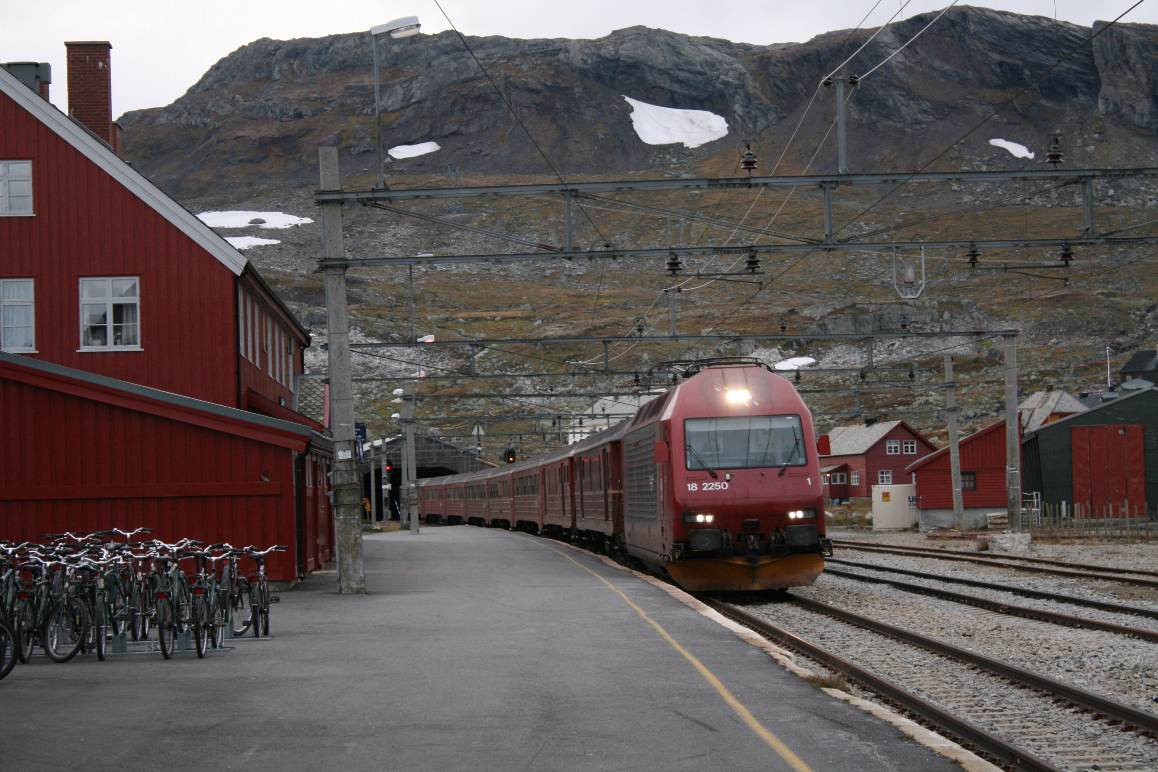 El 18 med persontog ankommer Finse stasjon